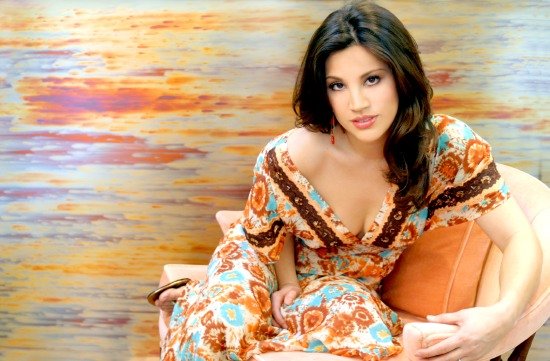 Victoria Recaño, television personality